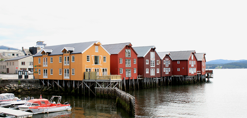 Sjøhus, Namsos, Nord-Trøndelag